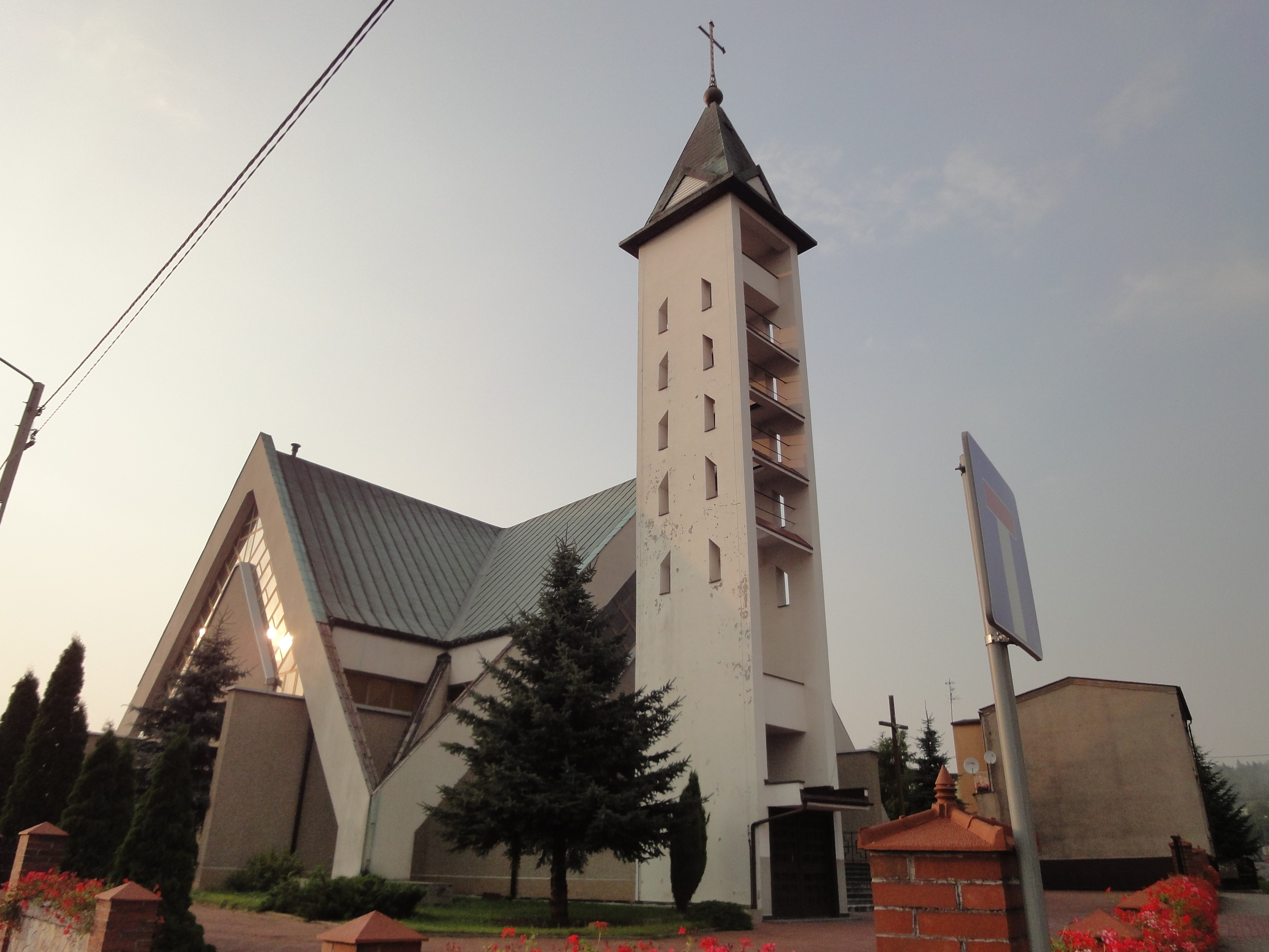 Zdjęcie przedstawia kościół parafialny w Rogoźniku